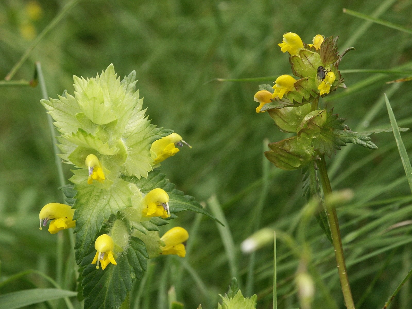 left:Rhinanthus alectorolophus right:Rh. minor, Schwäbisch-Fräkischer Wald, Germany